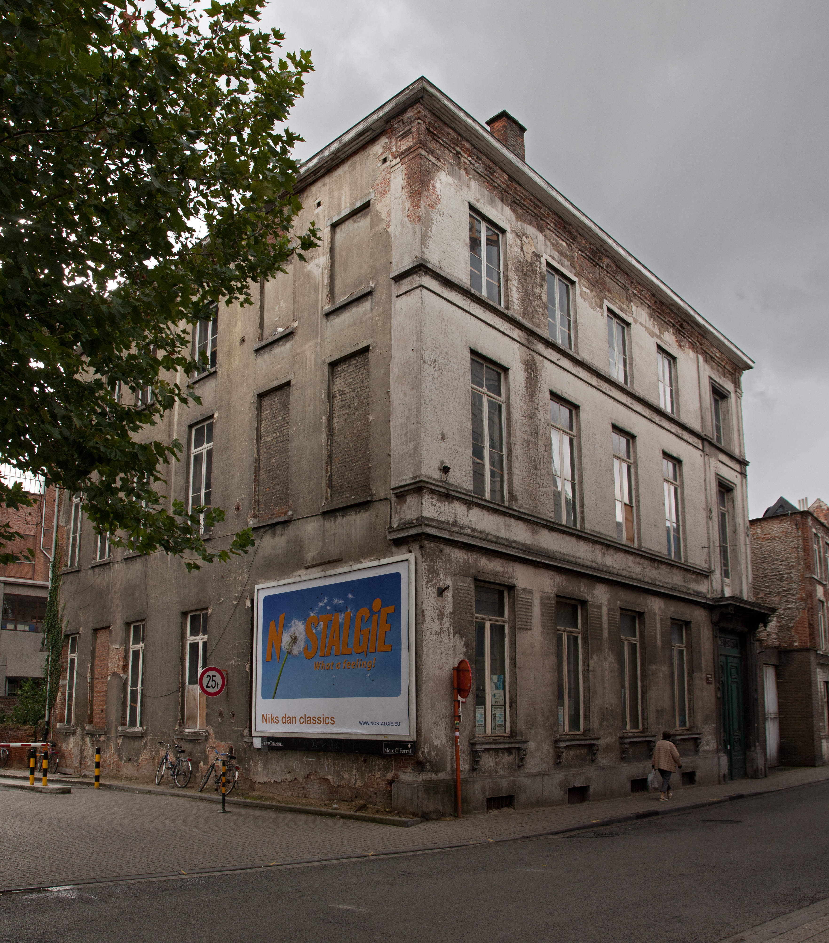 Brusselsestraat 77, Leuven